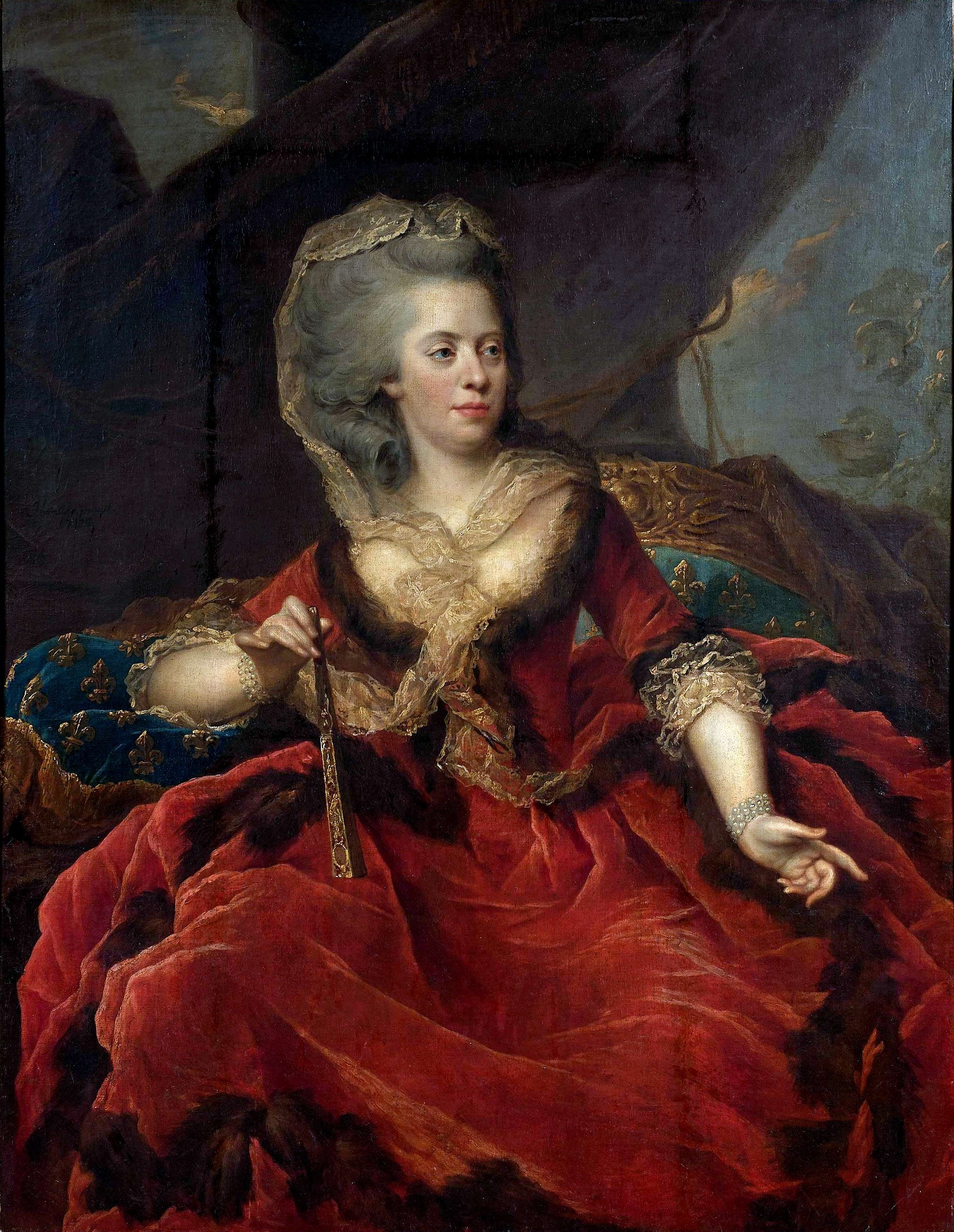 Marie-Adélaïde de France, dite Madame Adélaïde, fille de Louis XV (1732-1800)